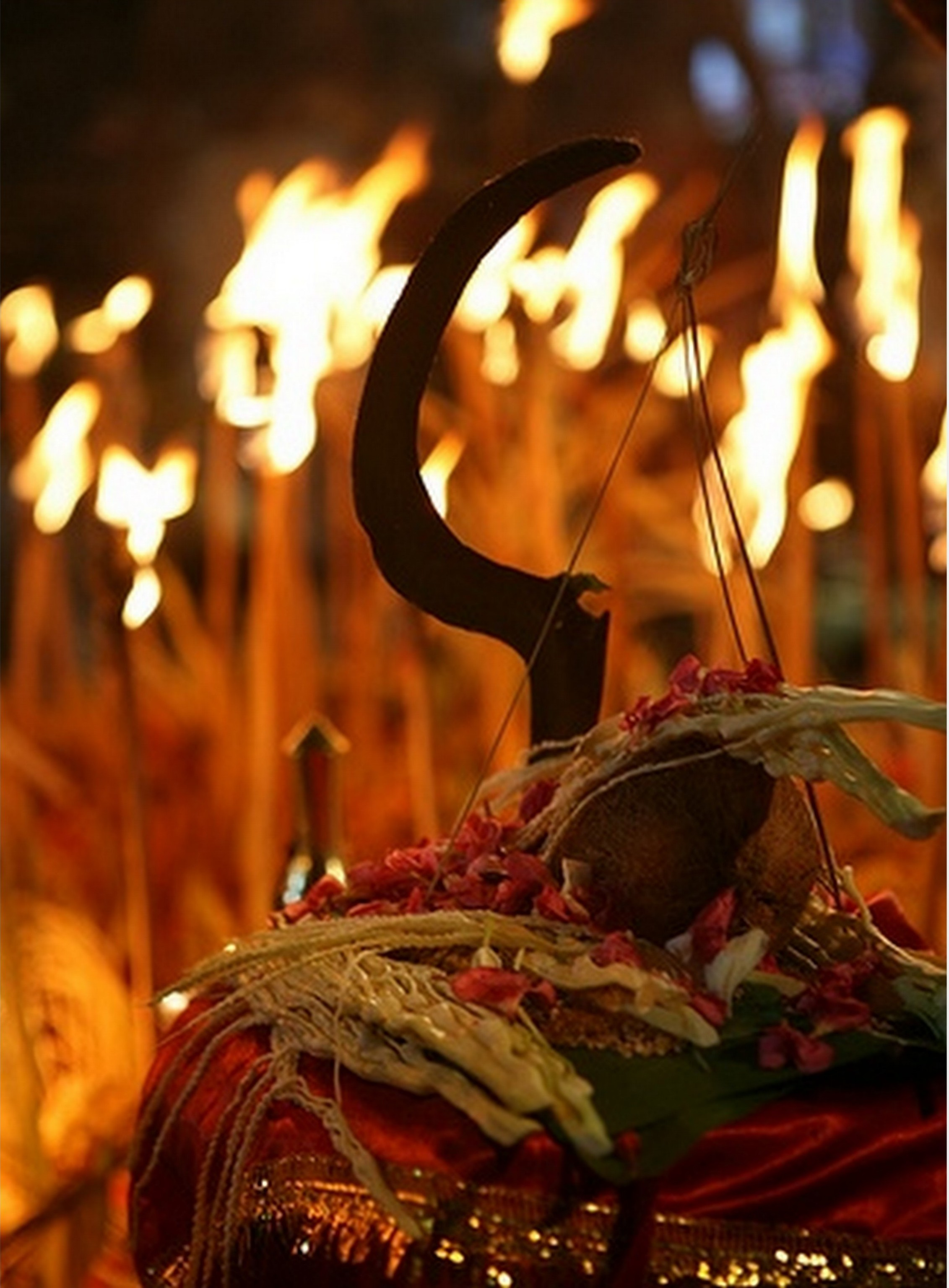 വലിയ ഗുരുതിക്കളം വാഴപ്പള്ളിയിലെ മുടിയെടുപ്പിൻ നാൾ രാത്രിയിൽ